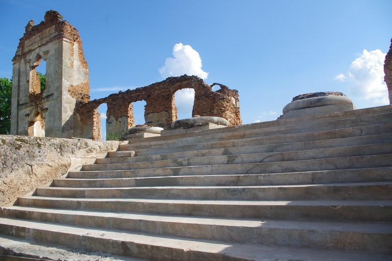 Paulavos respublikos liekanos